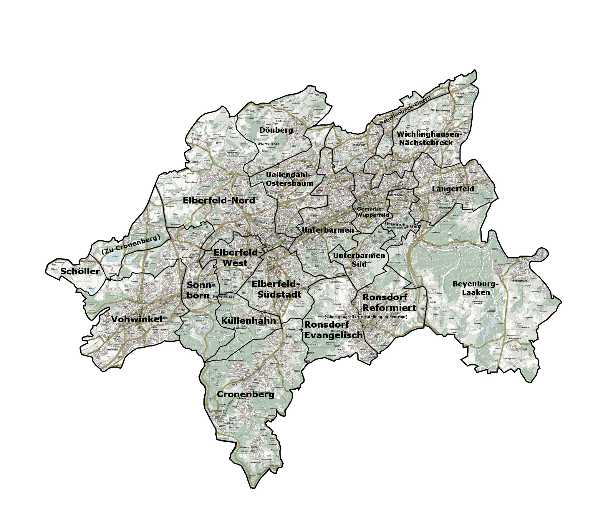 Überblick über die Evangelischen Kirchengemeinden in Wuppertal (2017)